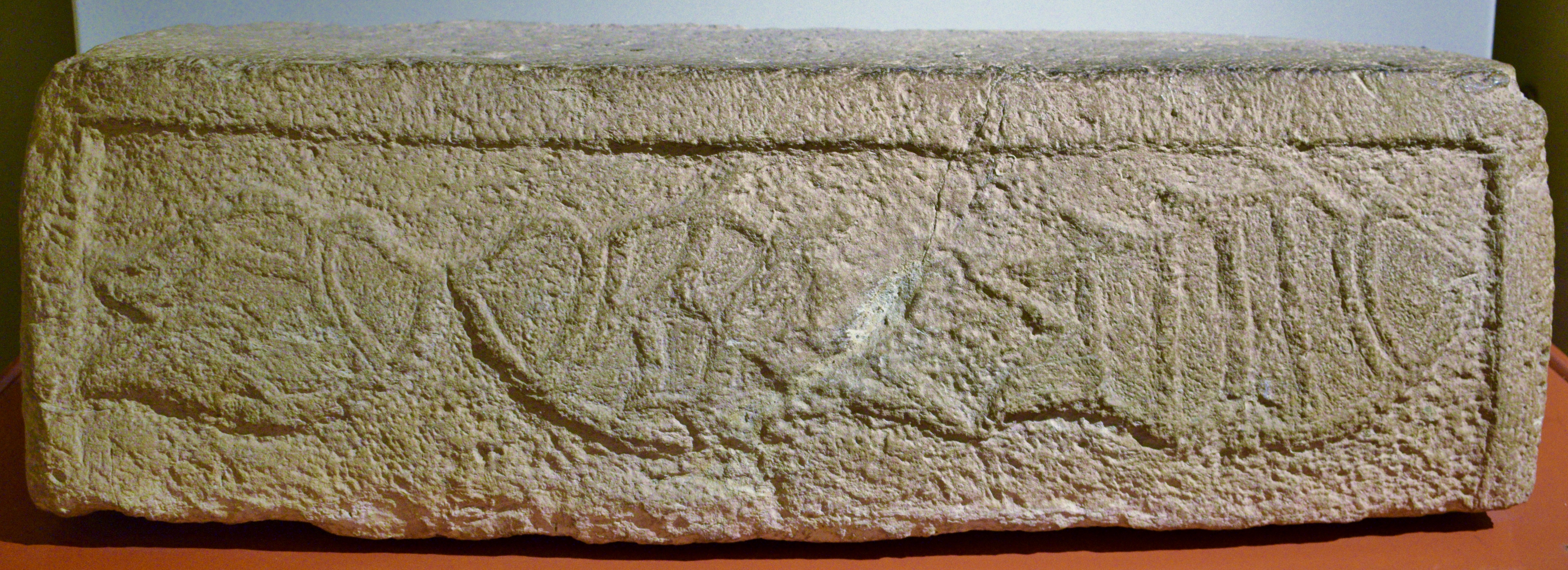 Museu Arqueològic Nacional de Malta. Malti: Mużew Nazzjonali tal-Arkeoloġija.